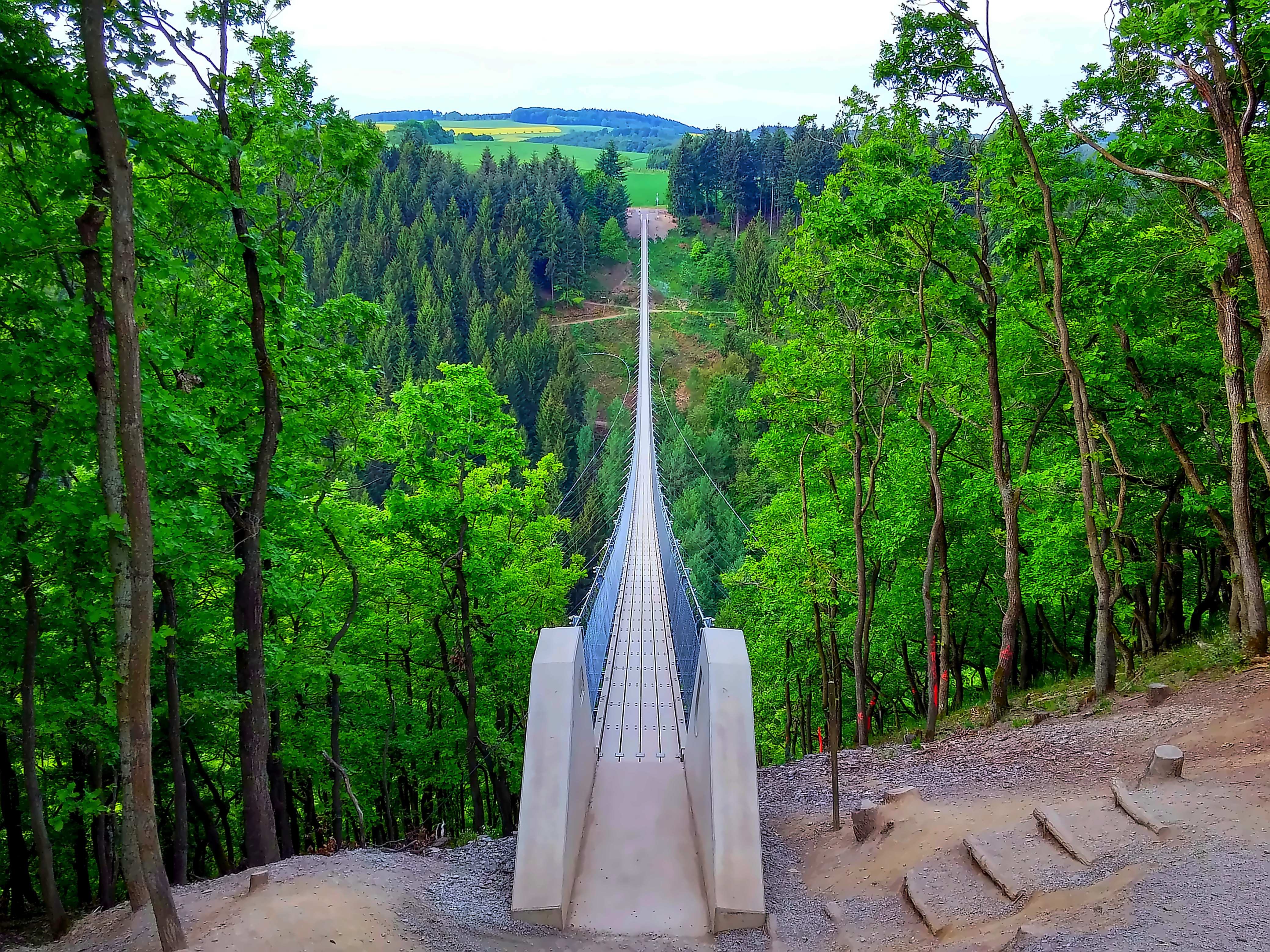 Zugang zur Hängeseilbrücke von Mörsdorf kommend